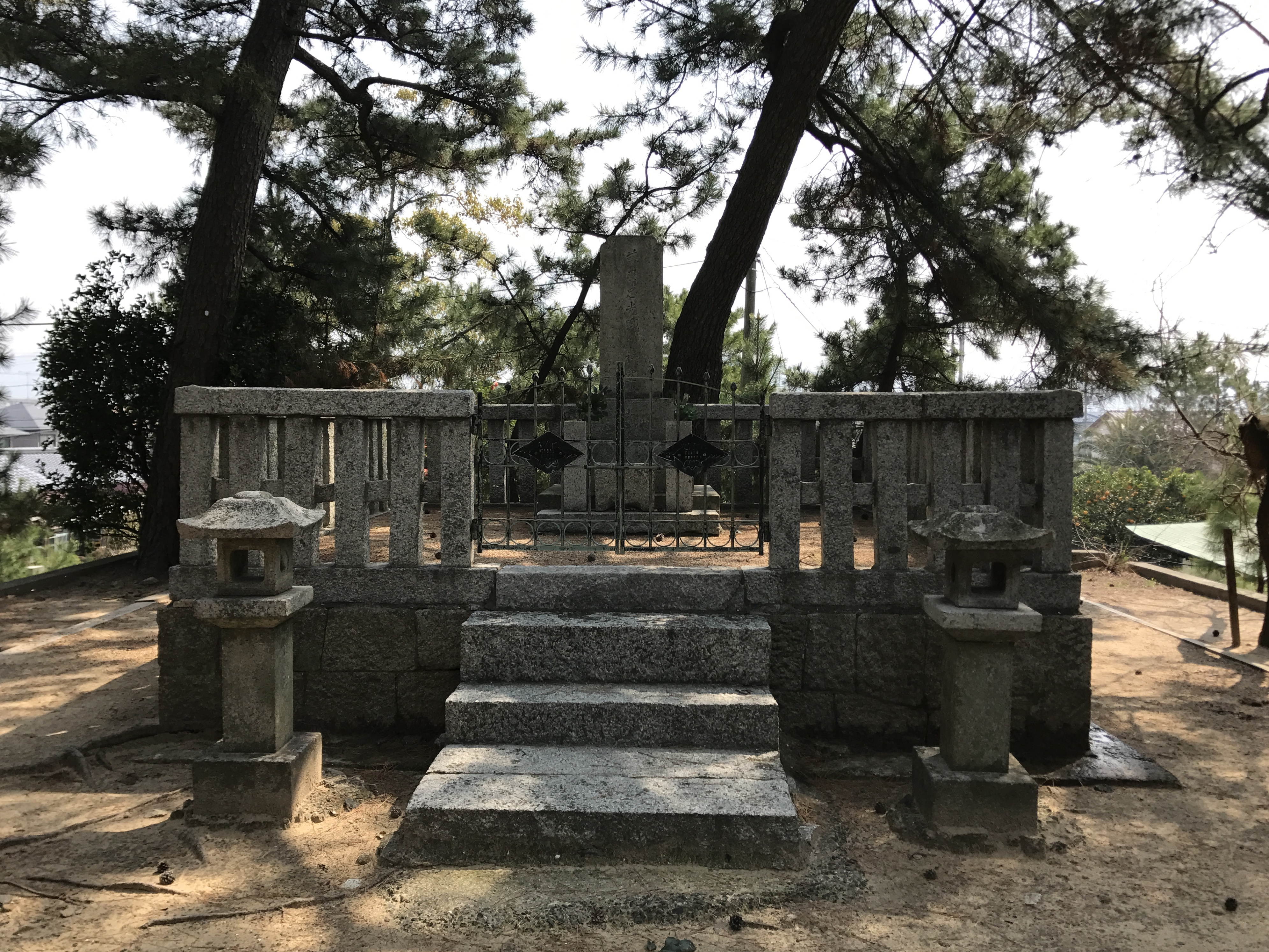 中山神社境内の中山忠光卿墓